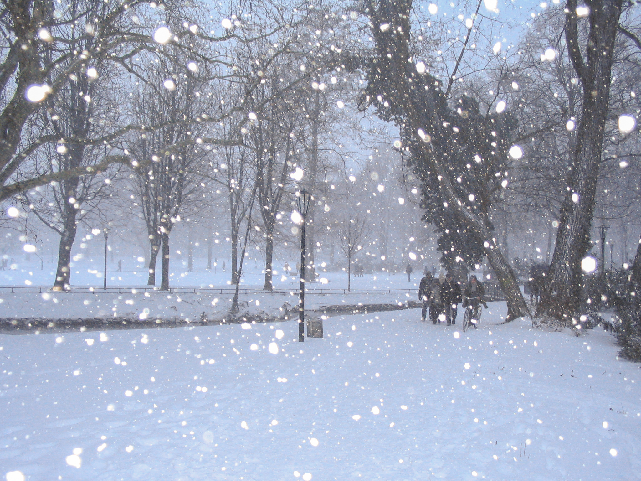 Schnee im Düsseldorfer Hofgarten im Dezember 2009